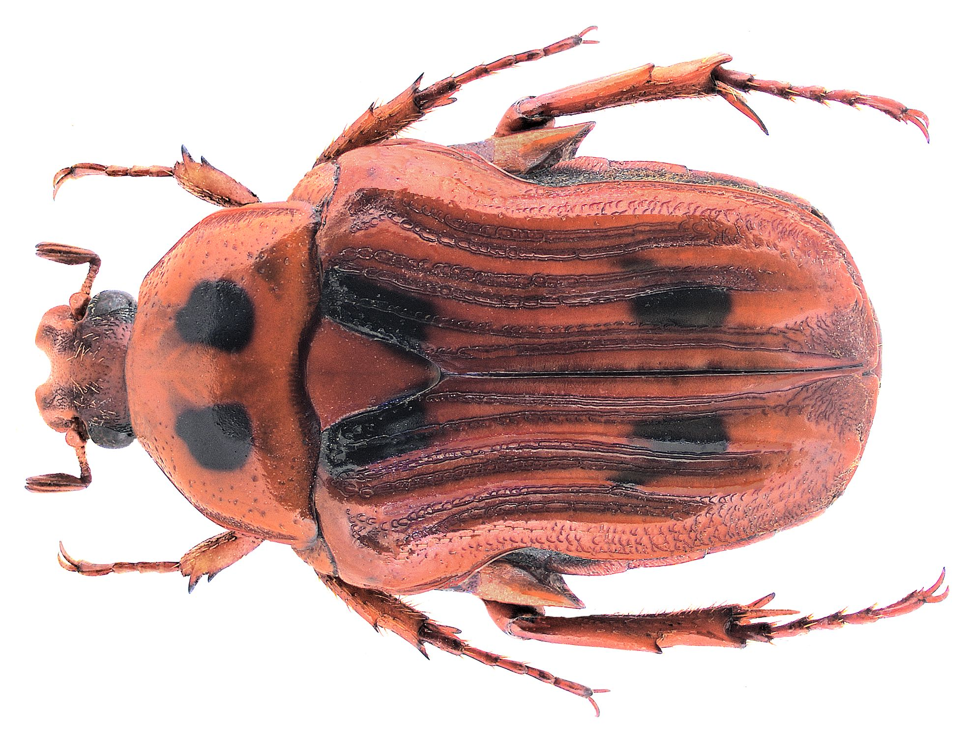 Familie: Scarabaeidae Groesse: 16 mm Fundort: Madagascar det. U.Schmidt Photo: U.Schmidt, 2007